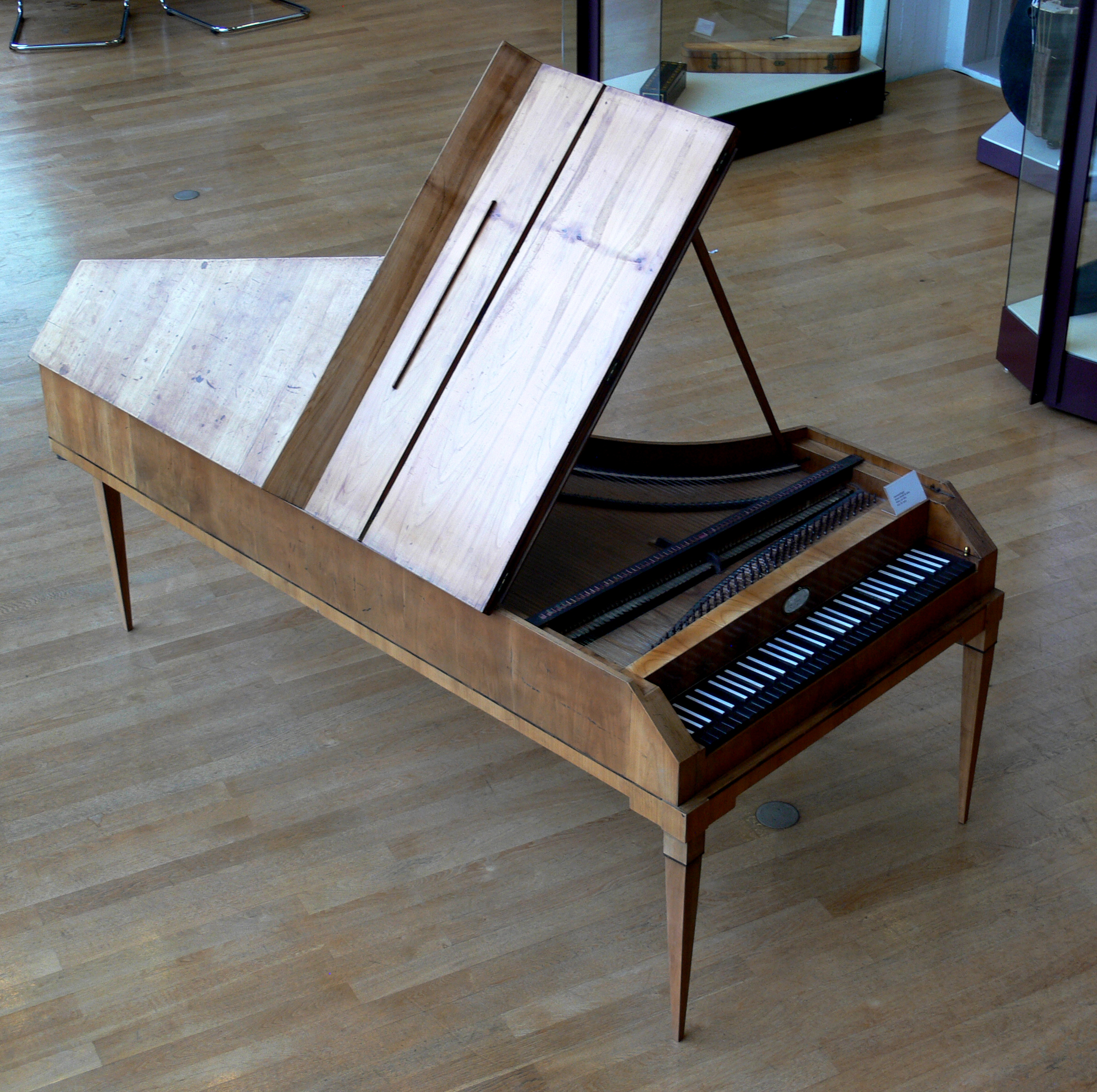 Hammerflügel, Anton Walter & Sohn, Wien um 1810 Musikinstrumentenmuseum Berlin, Kat.-Nr. 5423